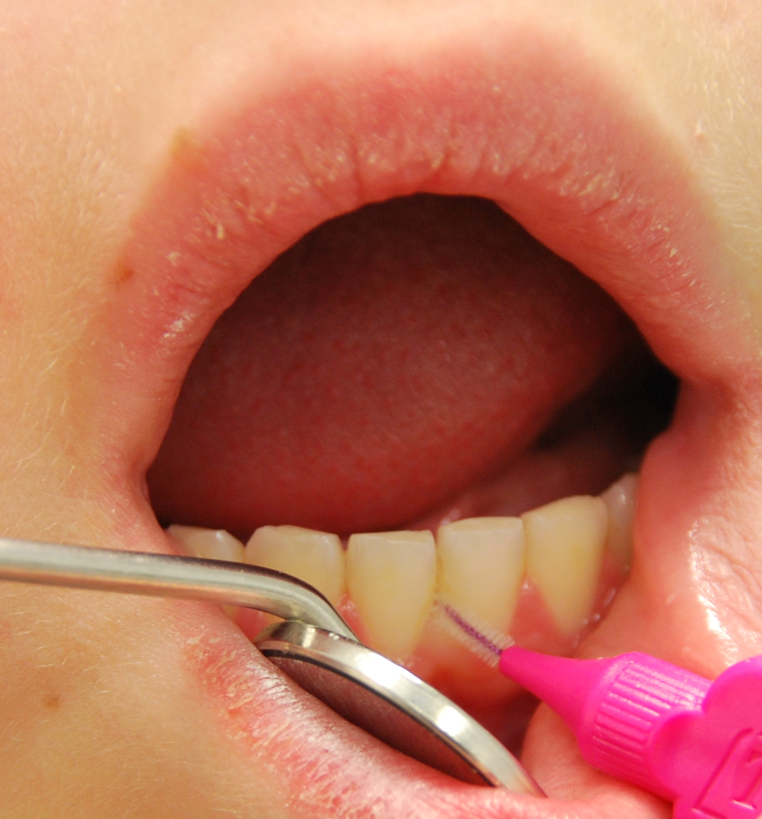 Dentalni hygiena mezizubni kartacek pri instruktazi pacienta